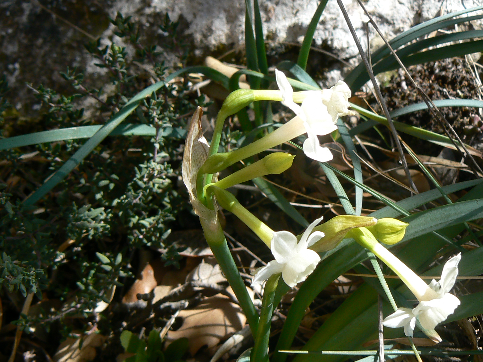 Description: Narcissus dubius Gouan